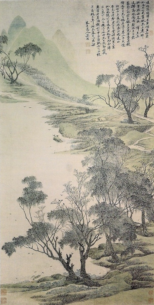 Version améliorée de ce fichier se rapprochant nettement de l'image originale.